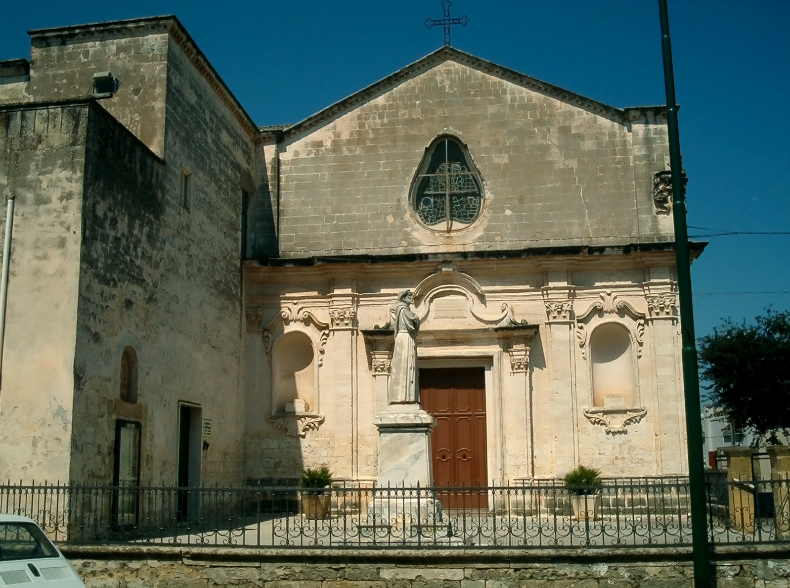 Convento francescano di Salice Salentino (Lecce)